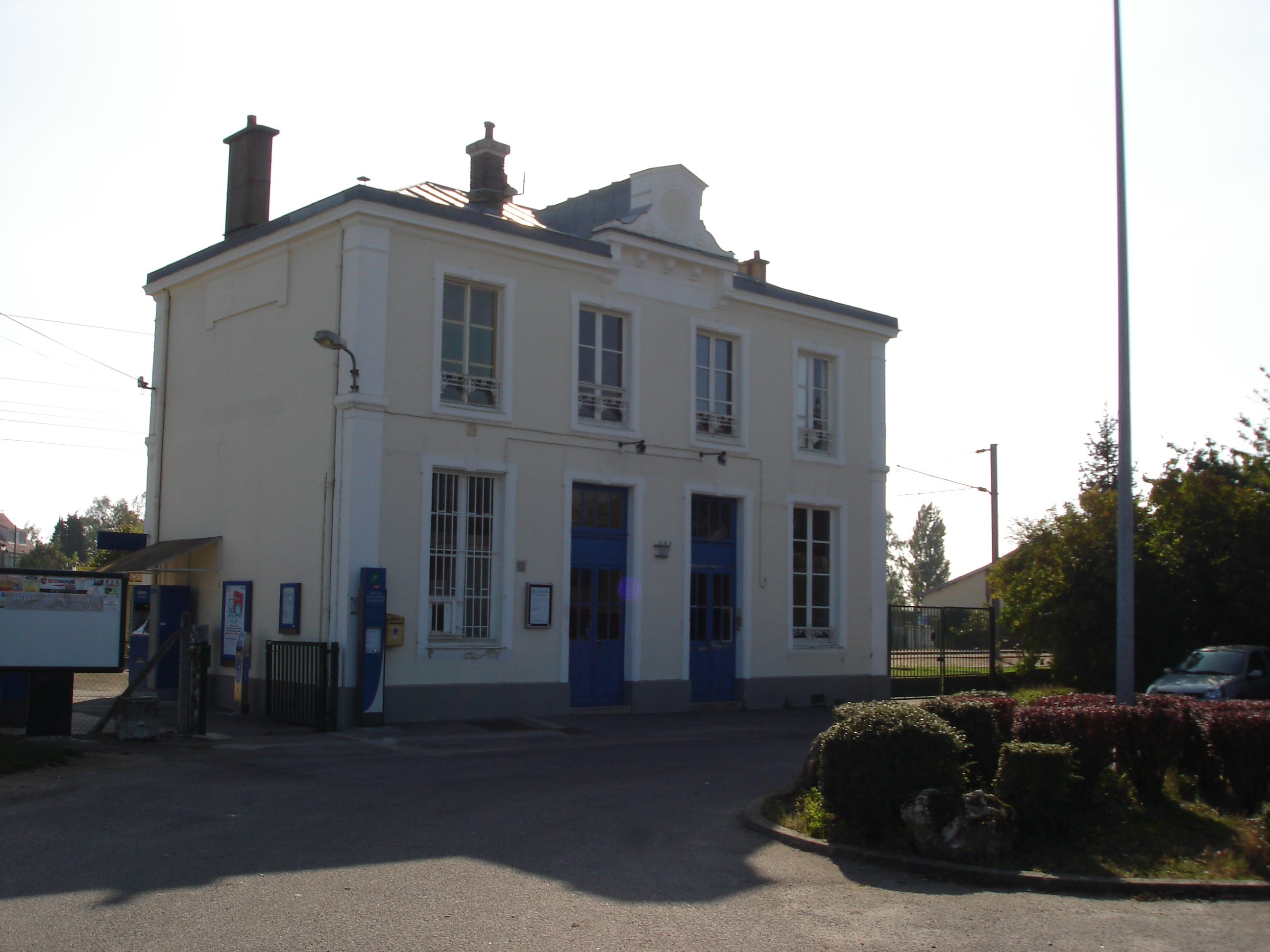 Gare de Tacoignières - Richebourg (78) : Le bâtiment voyageurs.